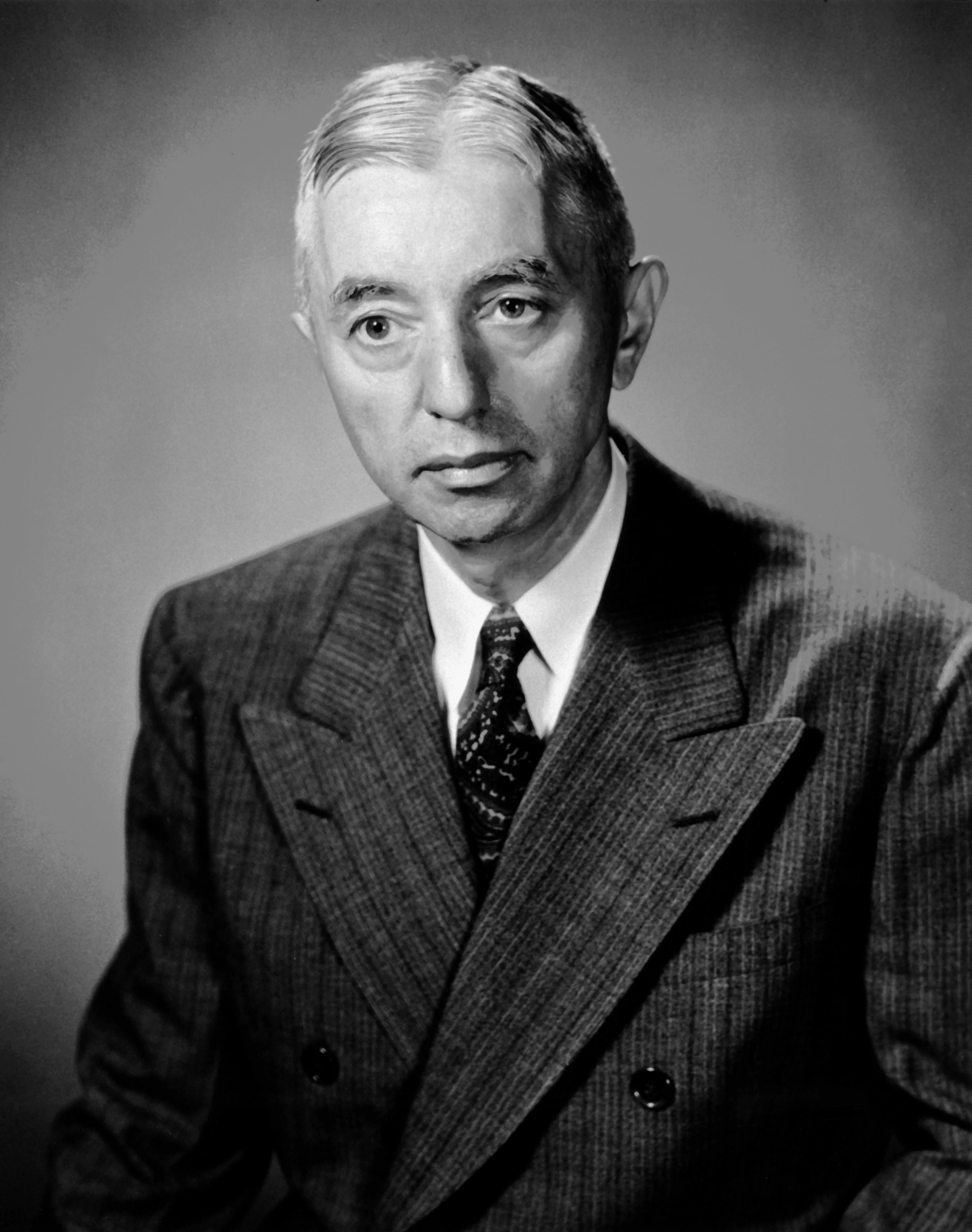 RADM Hyman G. Rickover, U.S. Navy